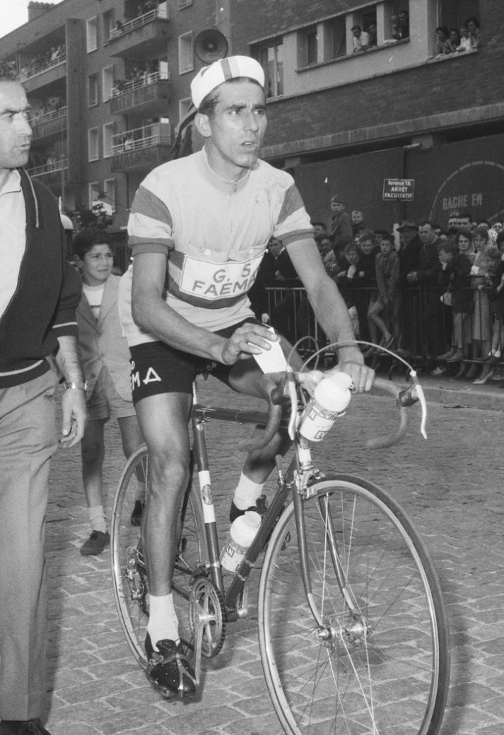 Tour de France , Bahamontes (op fiets)